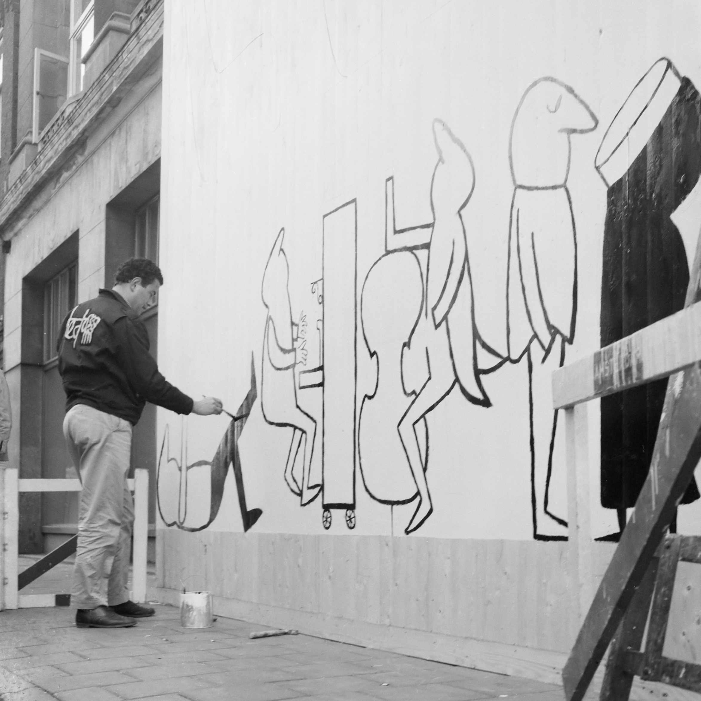 Ted Schaap schildert schutting KLM 17 maart 1961